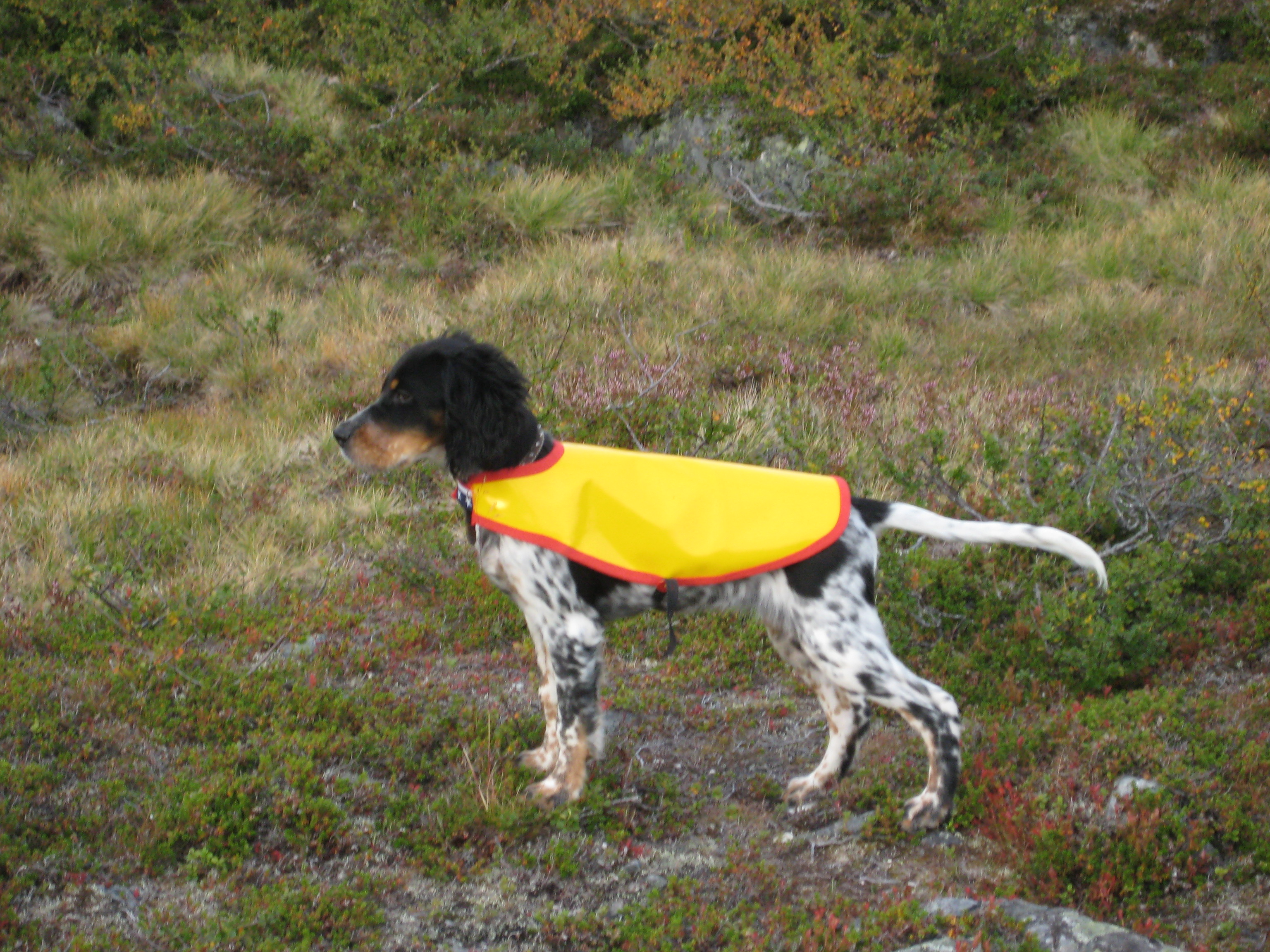 Stående fågelhundsvalp, Engelsk setter